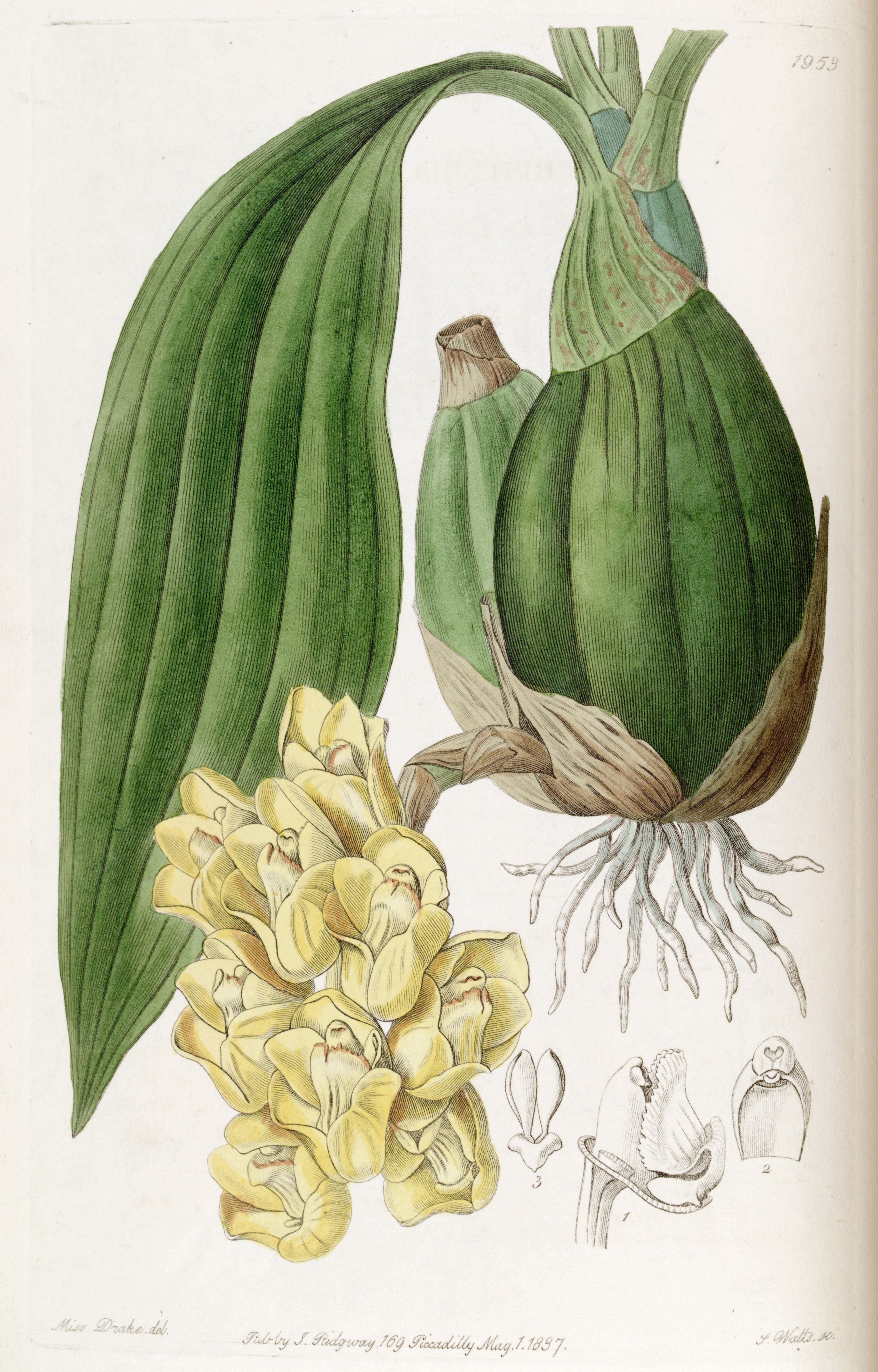 Peristeria cerina